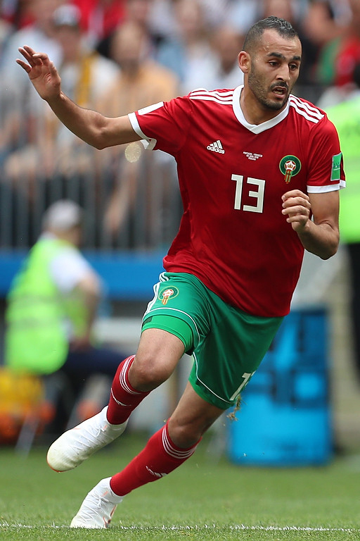 День, когда Роналду вошел в историю. Португалия в Москве обыграла Марокко